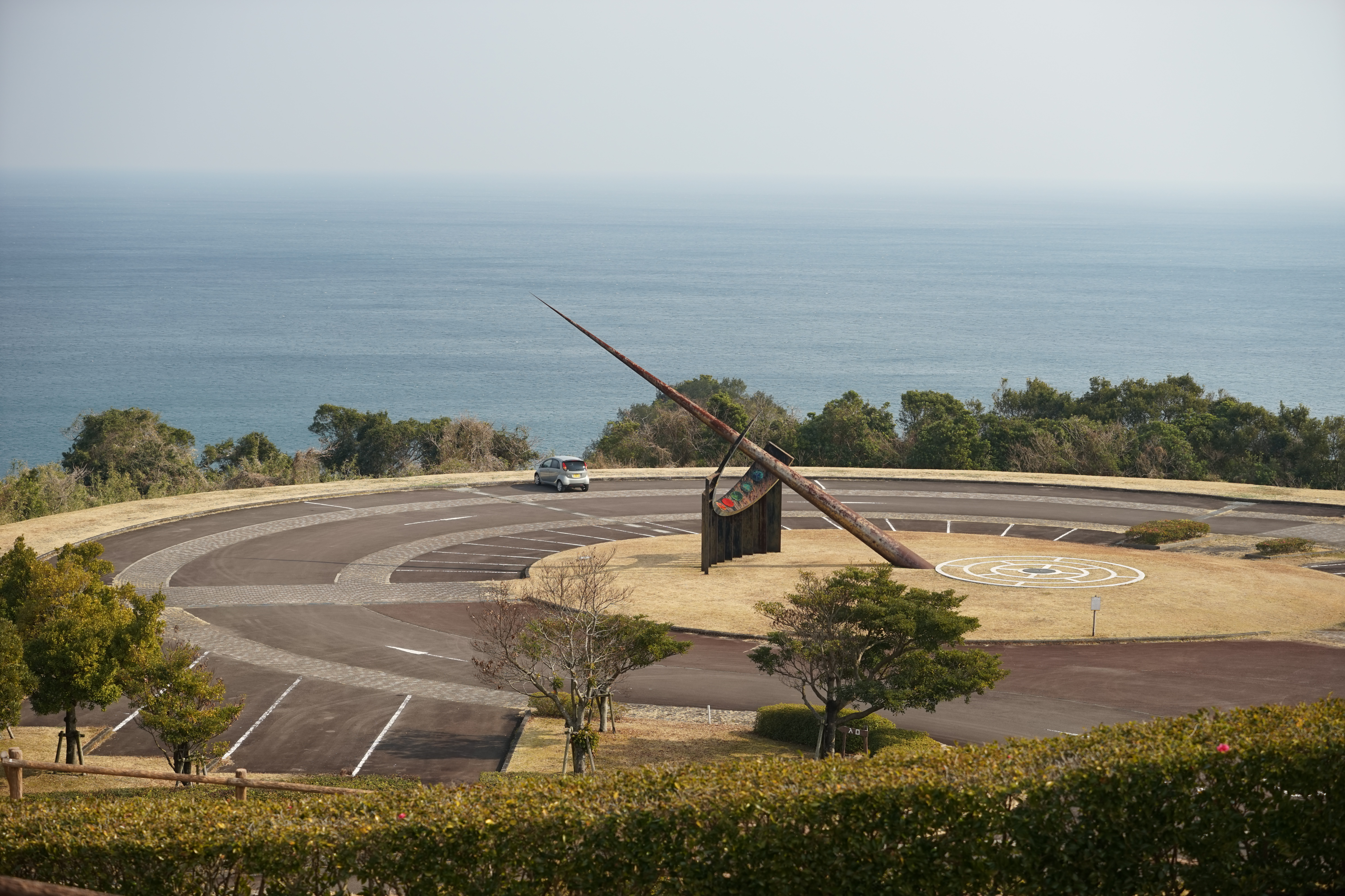 土佐西南大規模公園(四万十市下田）